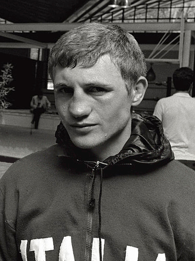 Enzo Petriglia, 1968 Olympics